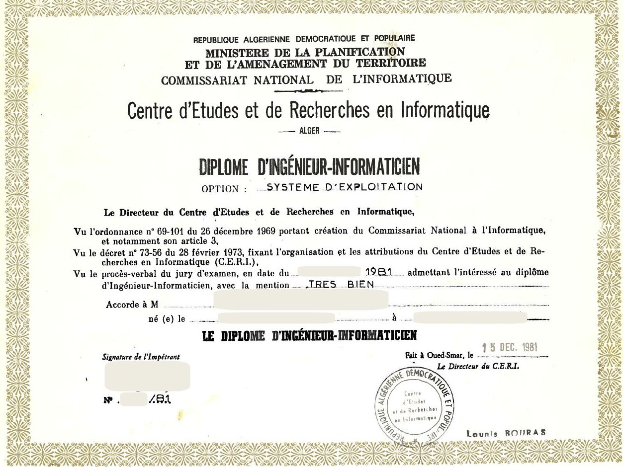 Scan d'un diplôme d'Ingénieur du CERI (Algérie) délivré en 1981